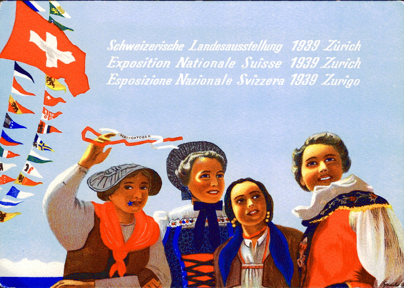 Landi 1939 Zürich, Schweiz